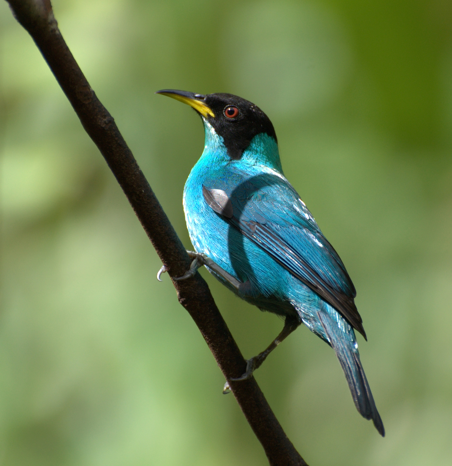 Folha Seca - Ubatuba-SP - Brasil